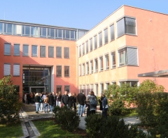 Teilansicht der Gebäude der Hochschule für Internationales Management Heidelberg in Heidelberg (Baden-Württemberg, Deutschland).